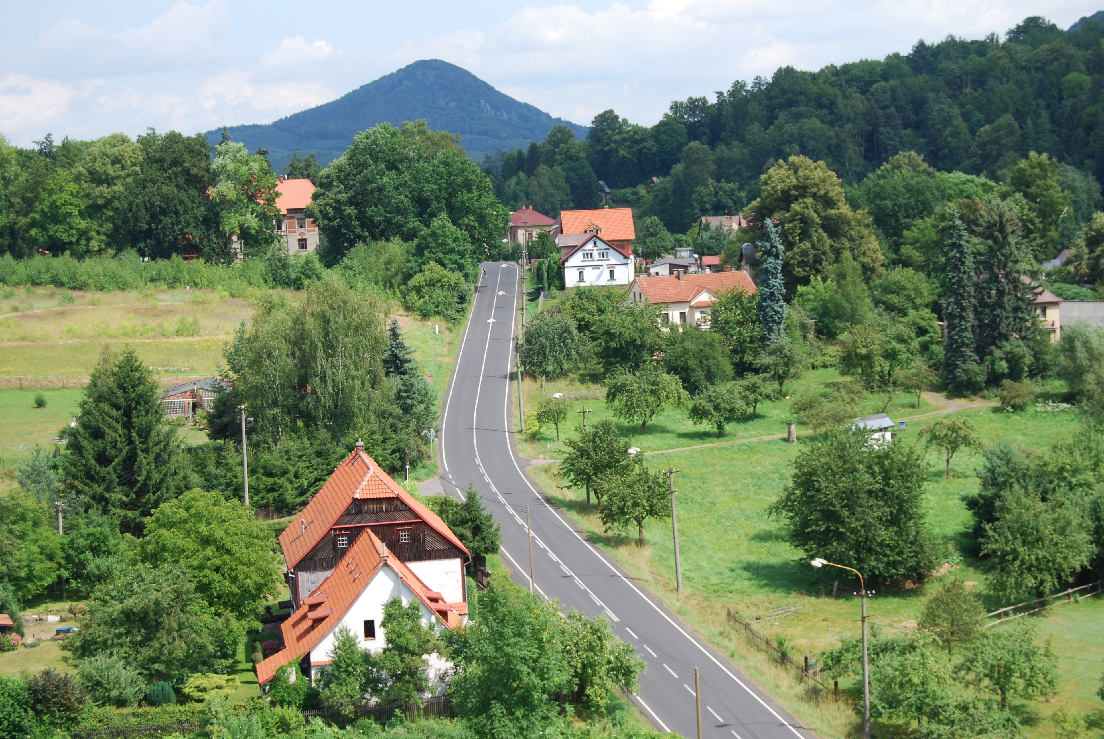 Česky: Pohled z vyhlídky poustevníka S. Görnera. Sloup - skalní hrad a poustevna v obci Sloup v Čechách nedaleko Nového Boru na Českolipsku. Česká republika. Object location 50° 44′ 9.58″ N, 14° 34′ 50.72″ E - OpenStreetMap - Proximityrama (Info)